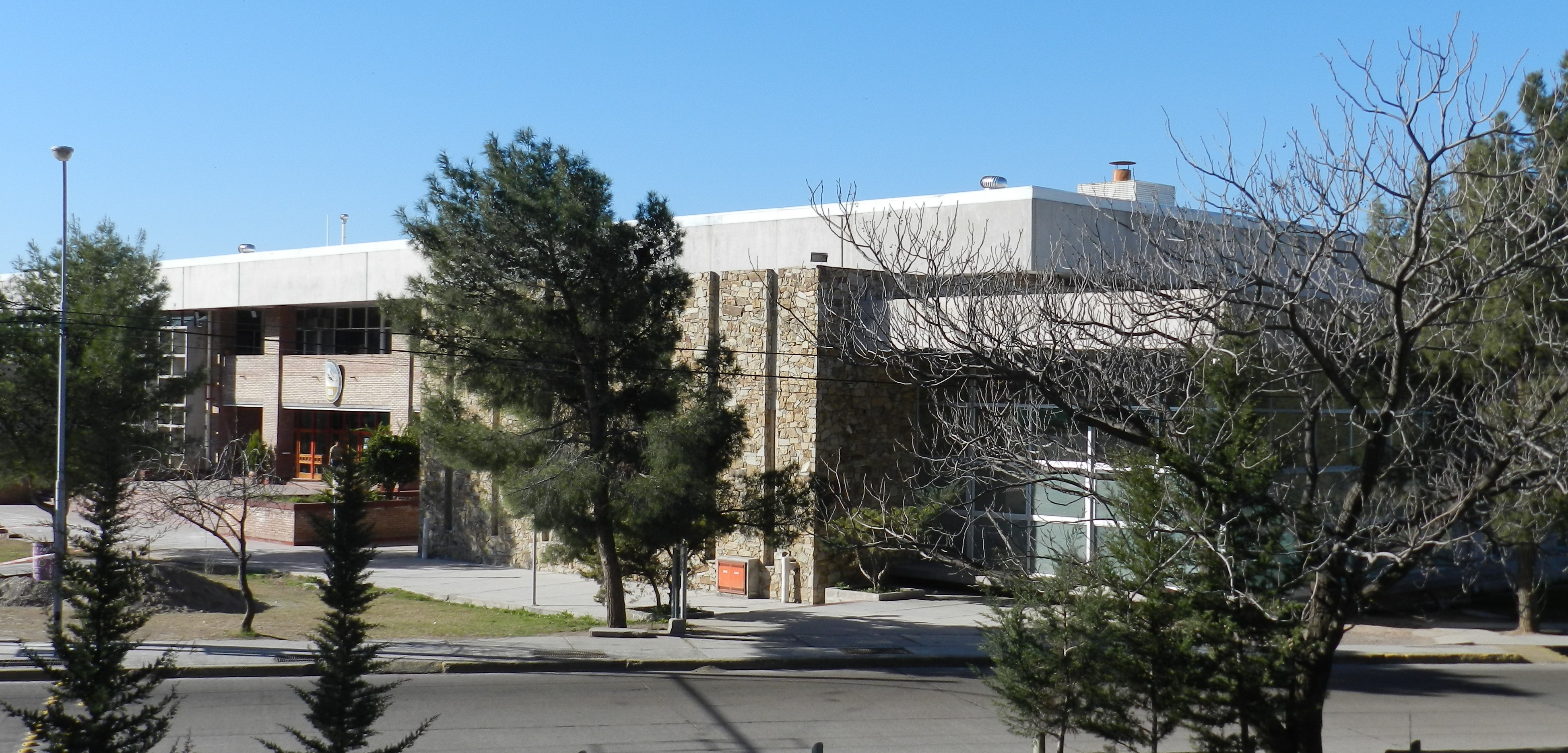 Facultad de Derecho UNCuyo